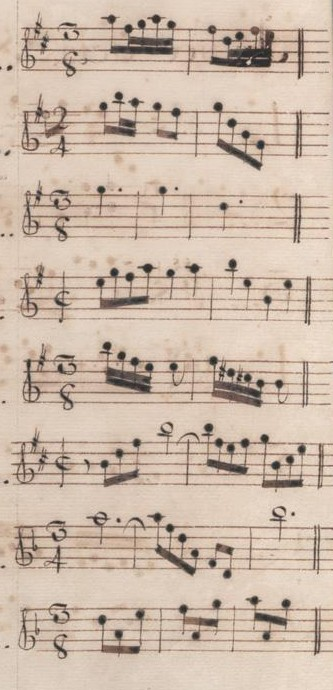 Table du volume V des manuscrits de Venise (incipit des sonates 23 à 30, K. 288 à 295).